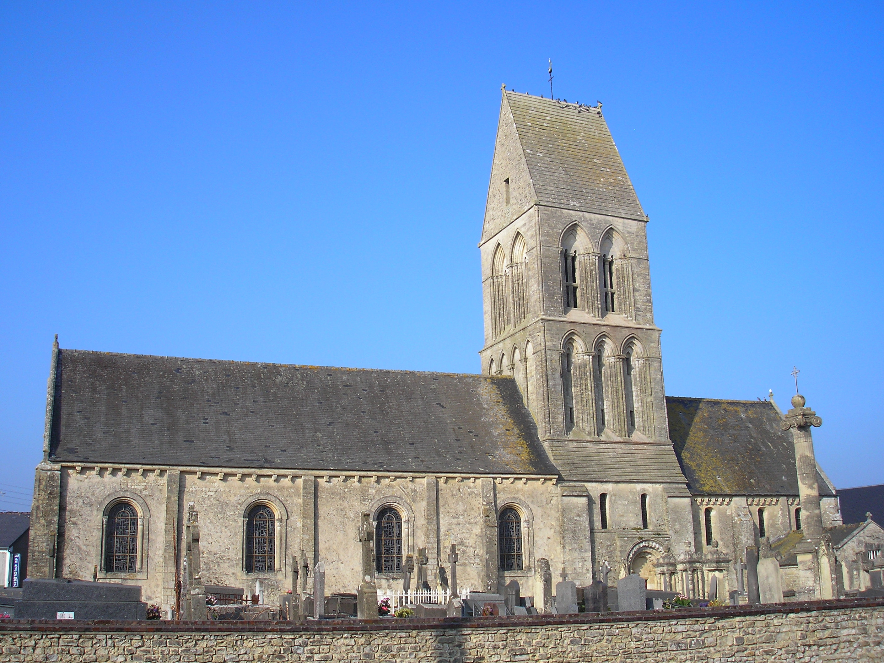 Formigny (Normandie, France). L'église Saint-Martin.